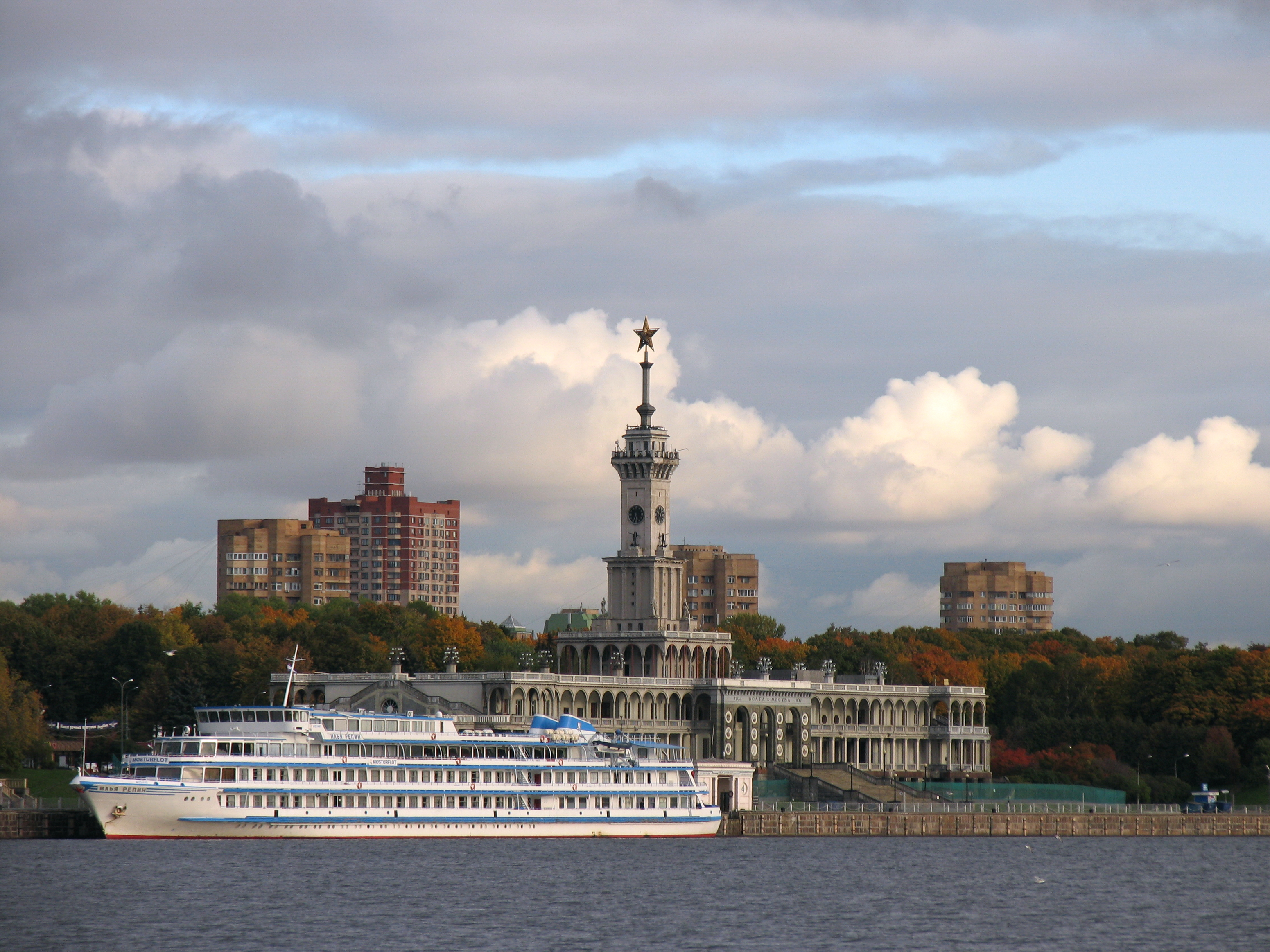 Речное круизное судно "Илья Репин" на фоне Северного речного вокзала. Москва.